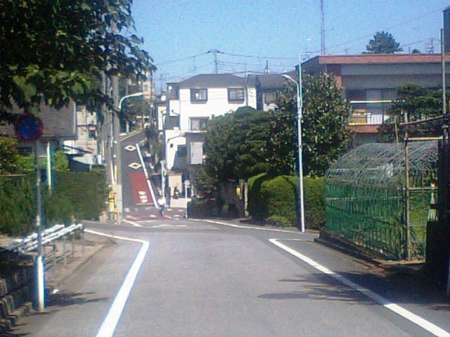 東京都板橋区四葉一丁目